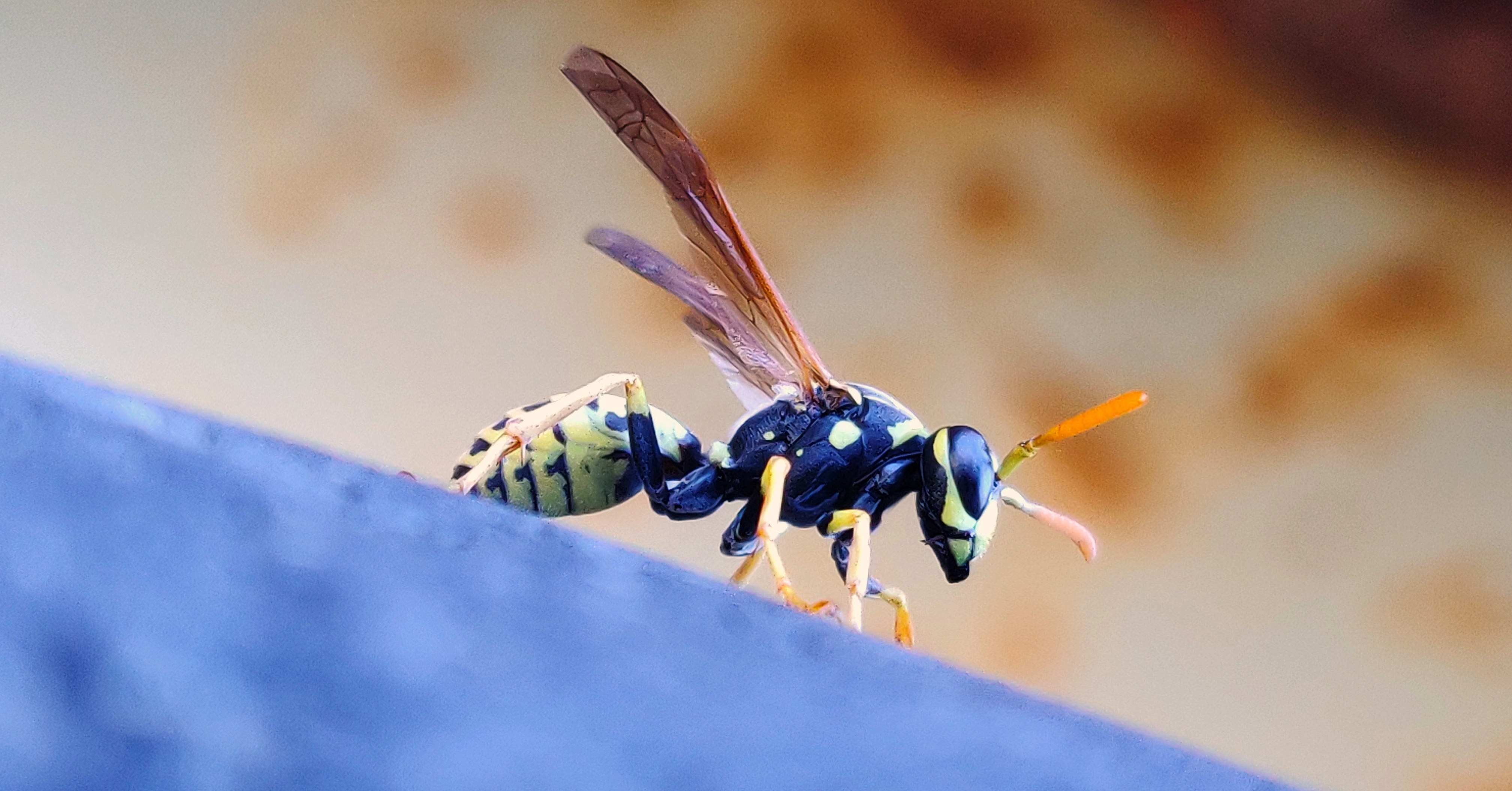 Macro fotografía de una véspula germánica obrera, las obreras siempre son hembras estériles.